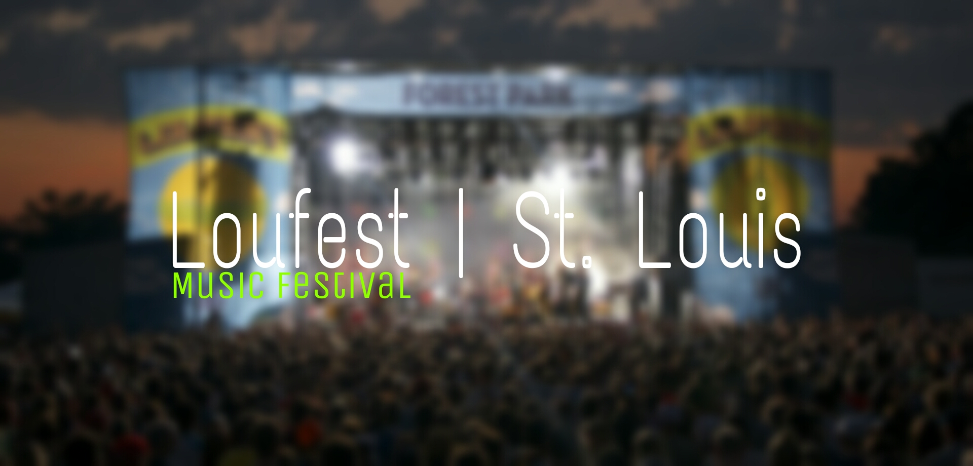 LouFest